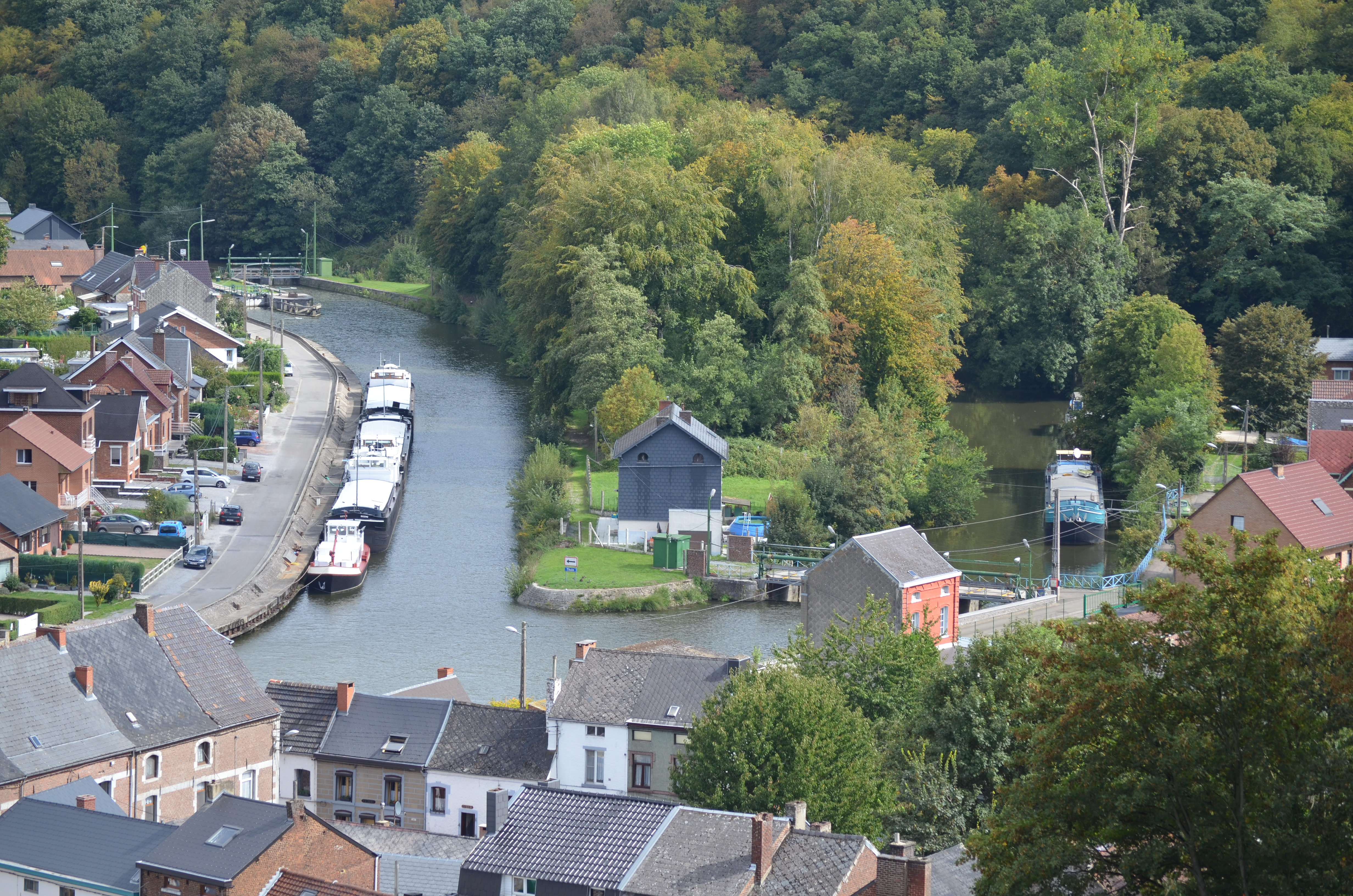 Thuin (Belgique) - Vallée de la Sambre vue depuis la ville-haute.